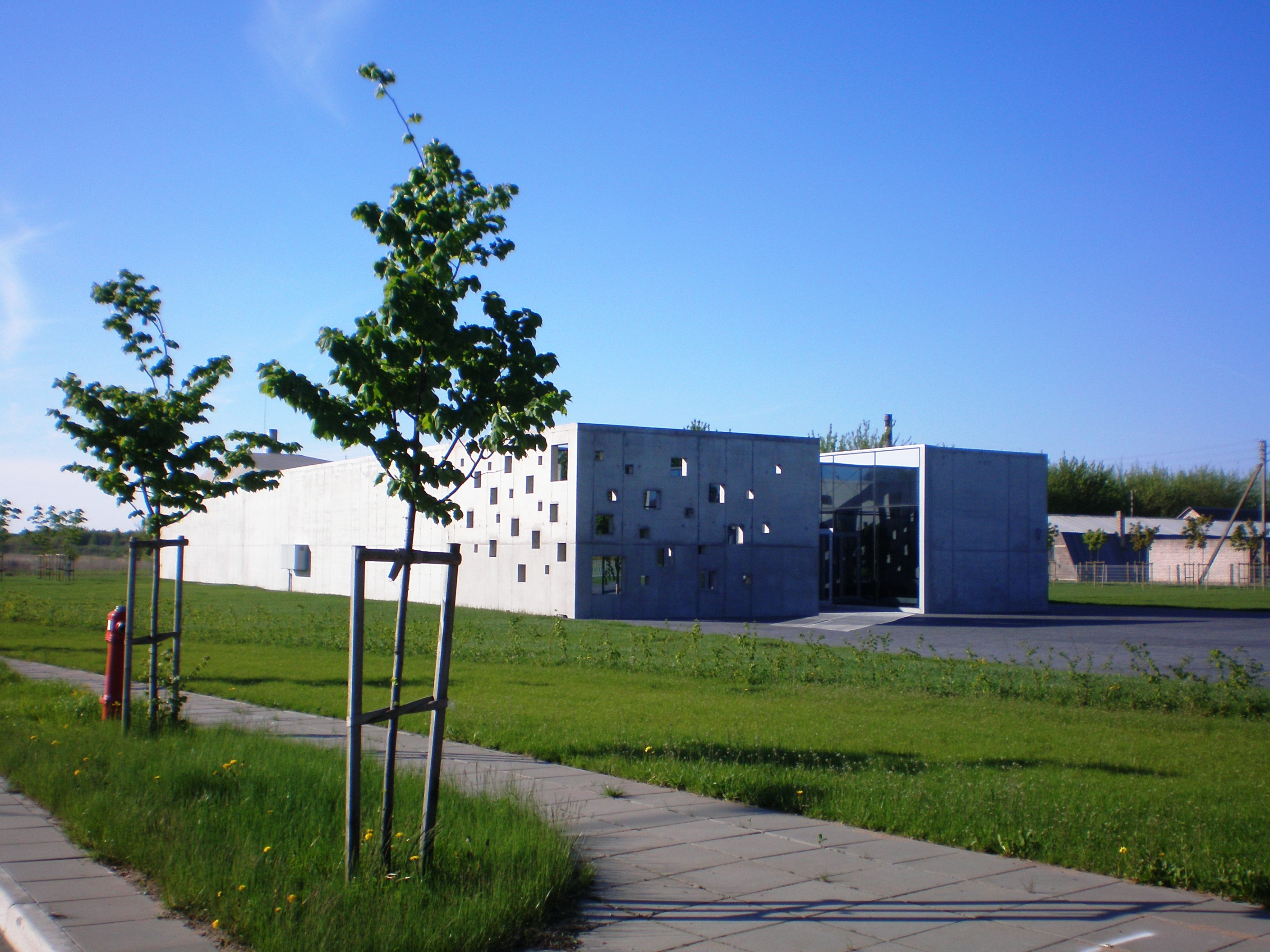 Lietuvos krematoriumas, Kėdainiai